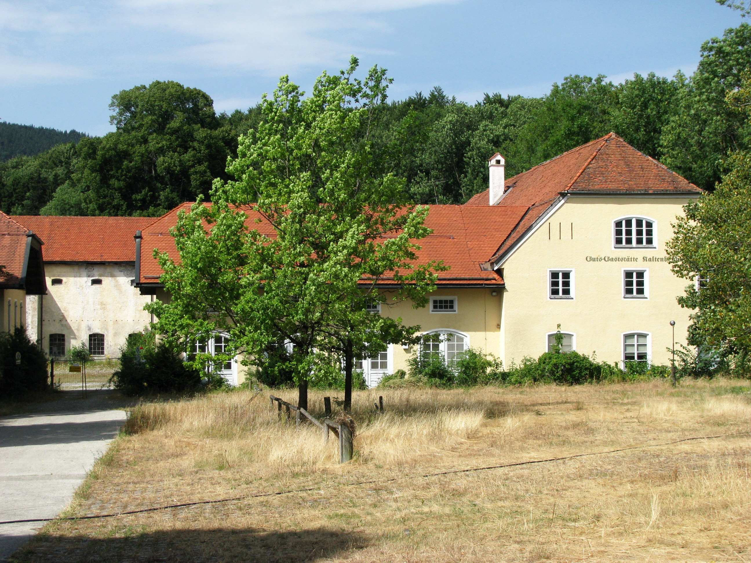 Gut Kaltenbrunn von Osten mit dem vormals als Gaststätte genutzten Trakt.